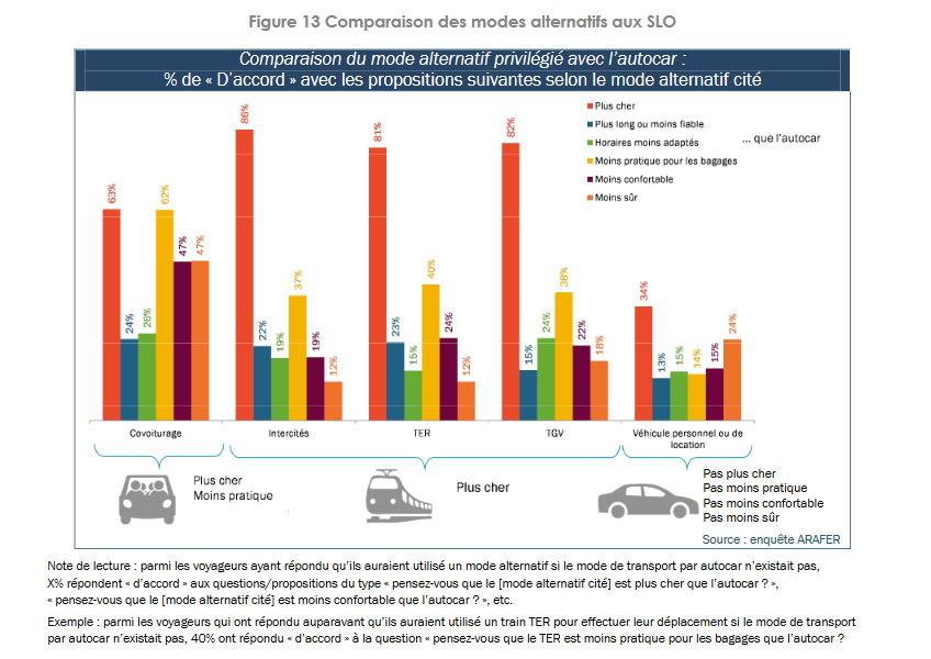 Source : Arafer